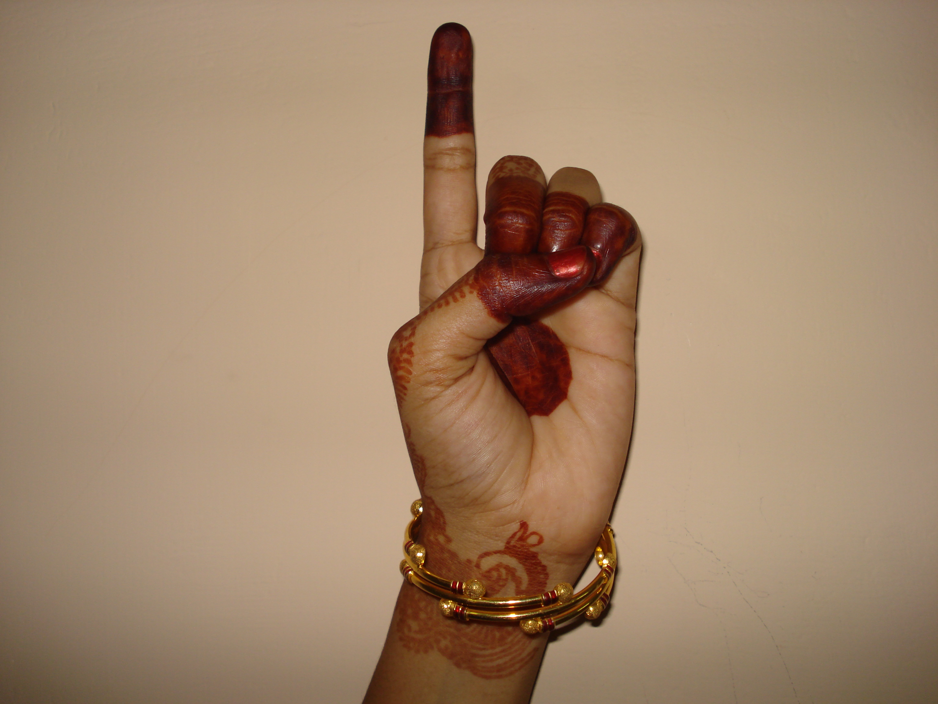 സുചീഹസ്തം